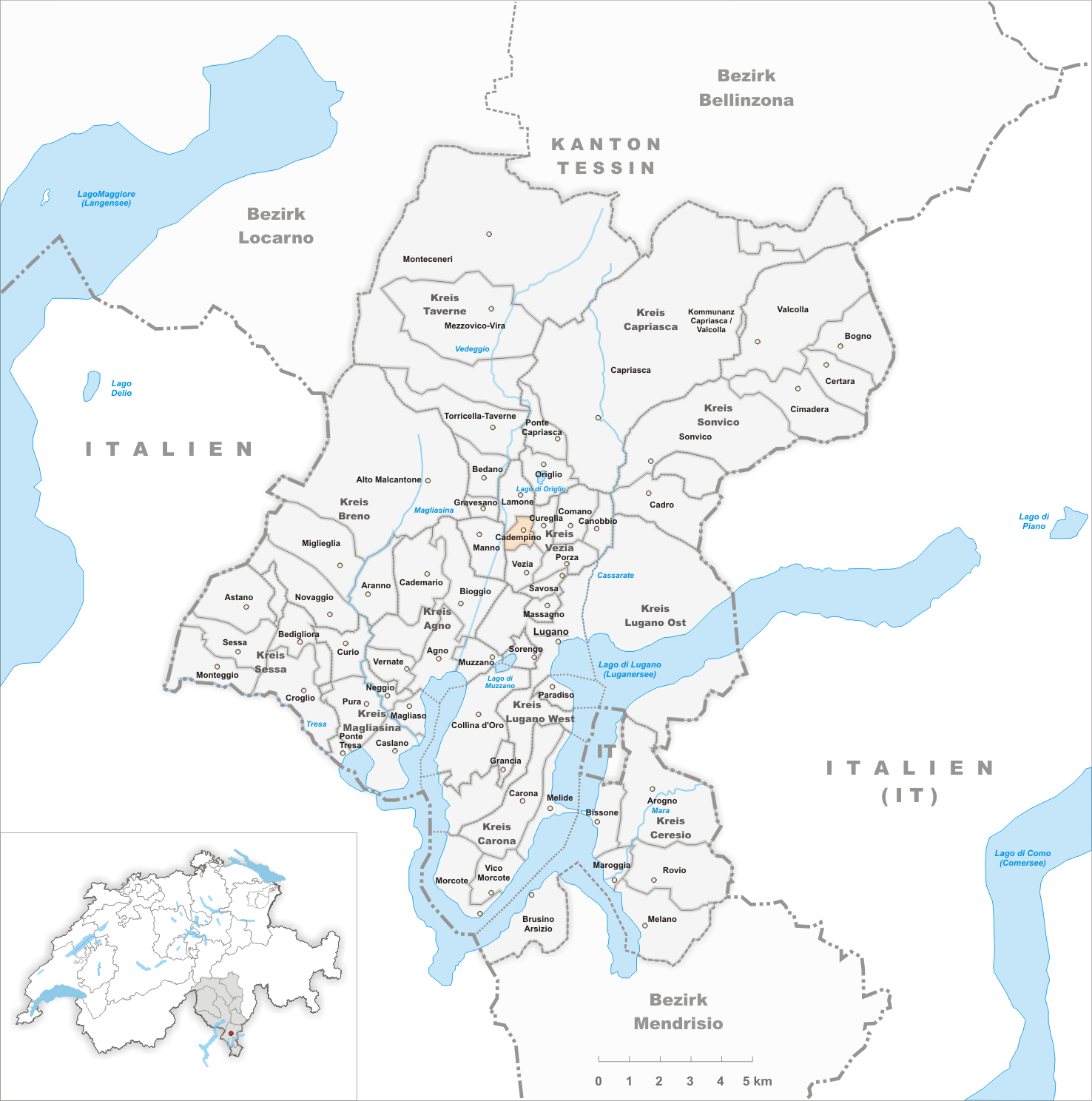 Municipality Cadempino